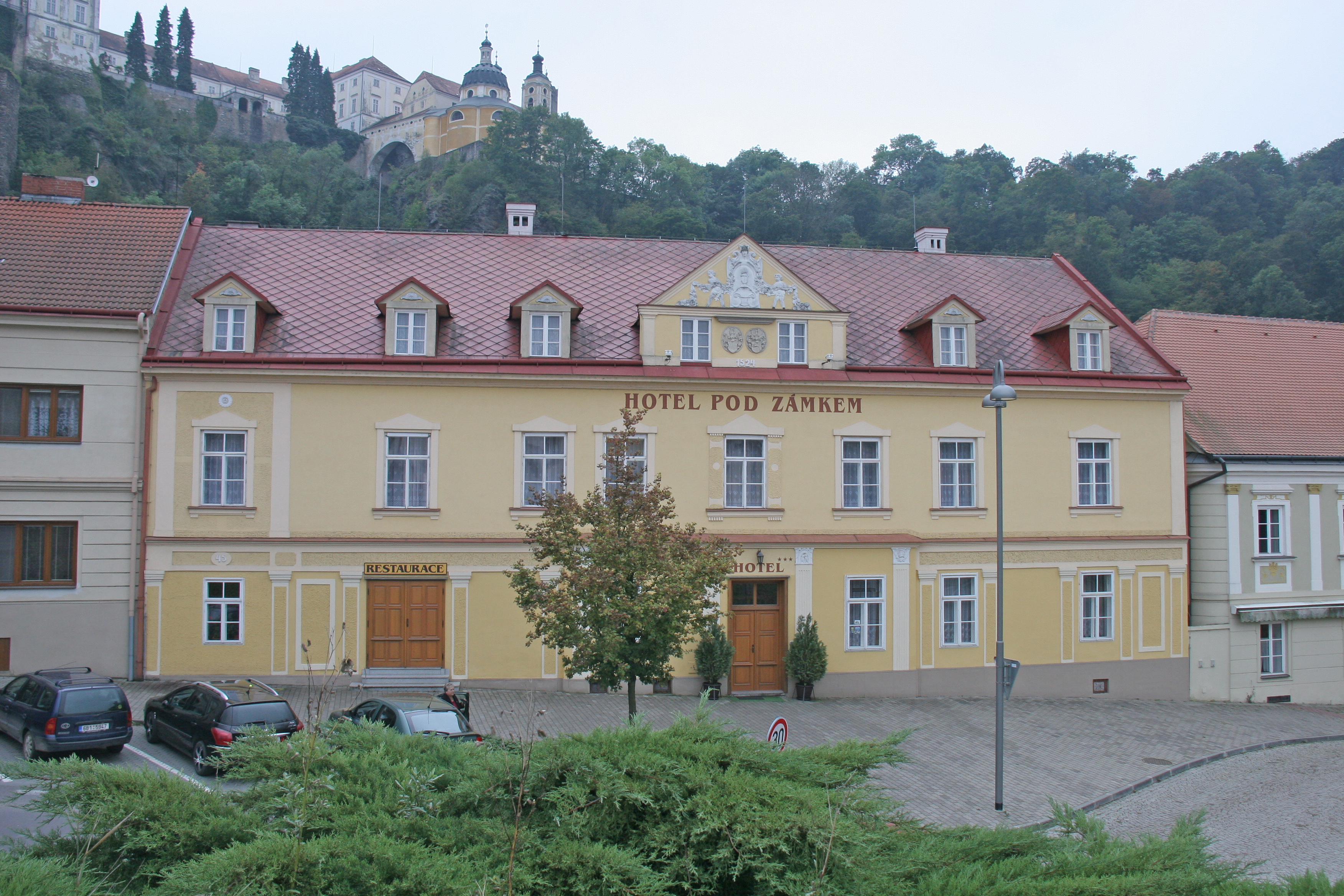 Dům čp. 45, Vranov nad Dyjí 45, náměstí, Vranov nad Dyjí.